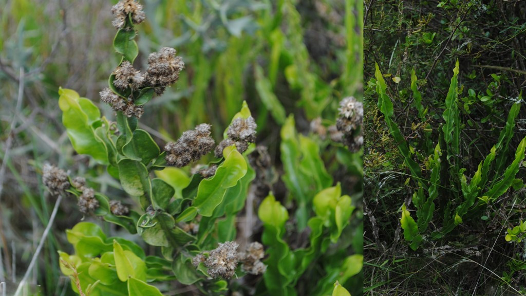 Baccharis jocheniana. Asteraceae. Fotos tomadas entre gramíneas en ladera al margen del Arroyo del Oeste en Sierras de Rocha, departamento de Rocha, Uruguay.